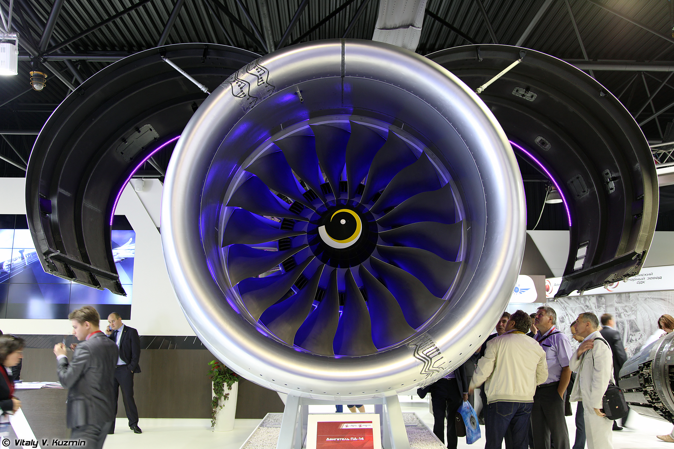 Двигатель ПД-14